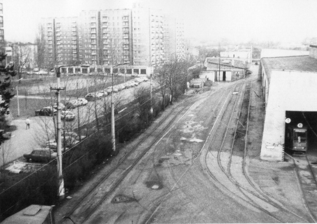 Zajezdnia tramwajowa przy ul. Głogowskiej w Poznaniu. 1991r.